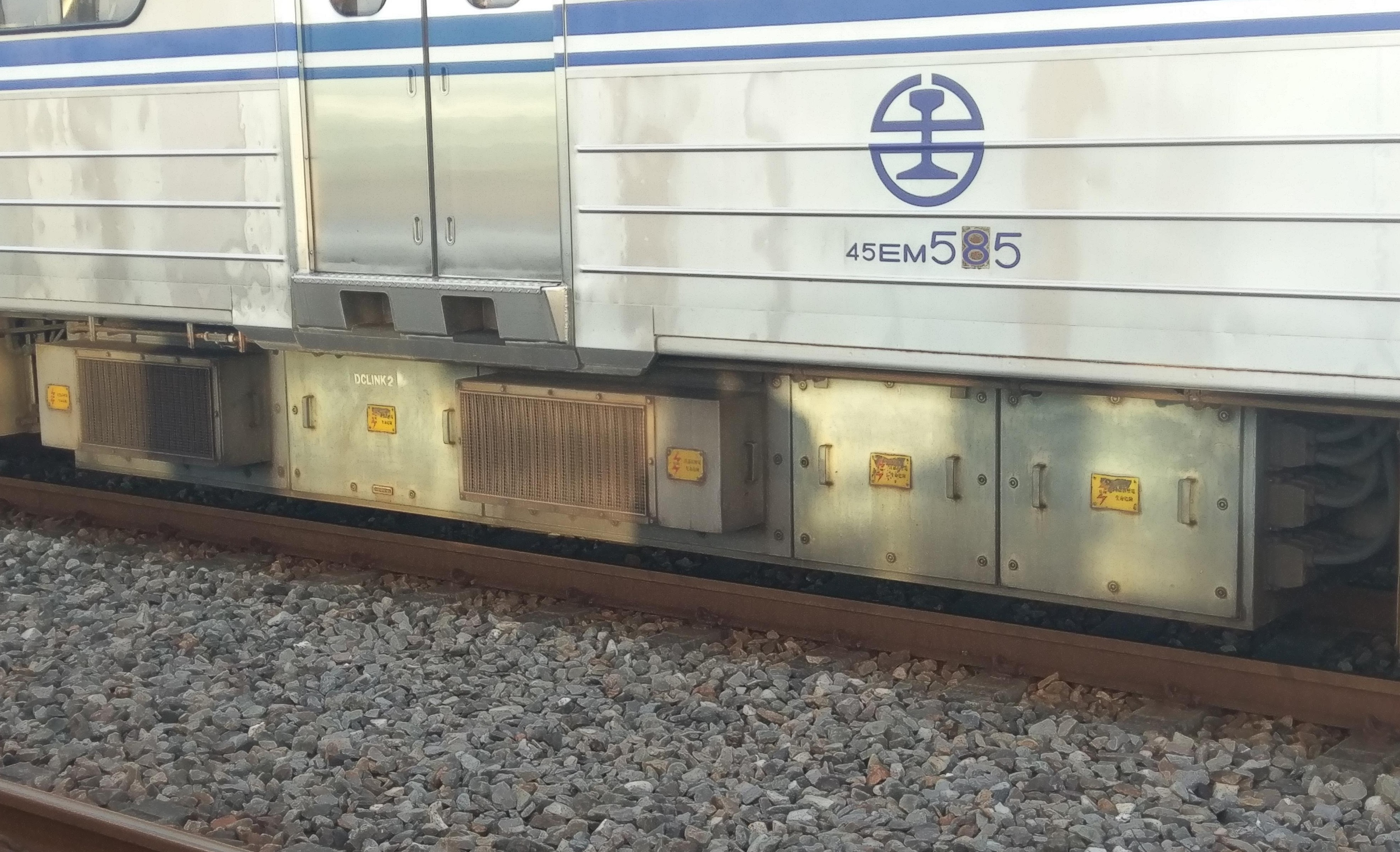 中文（台灣）: 台鐵EMU500型電聯車EM585的牽引整流、變流器設備箱